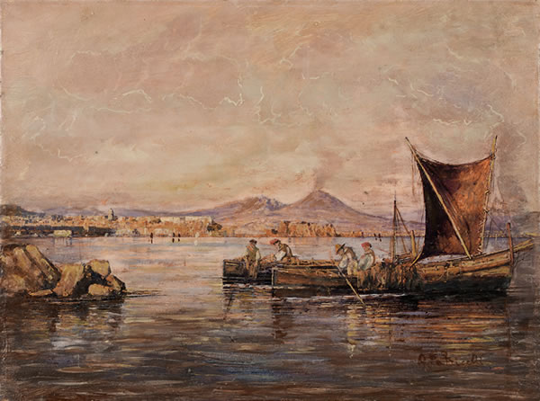 Le golfe de Mergellina à Naples